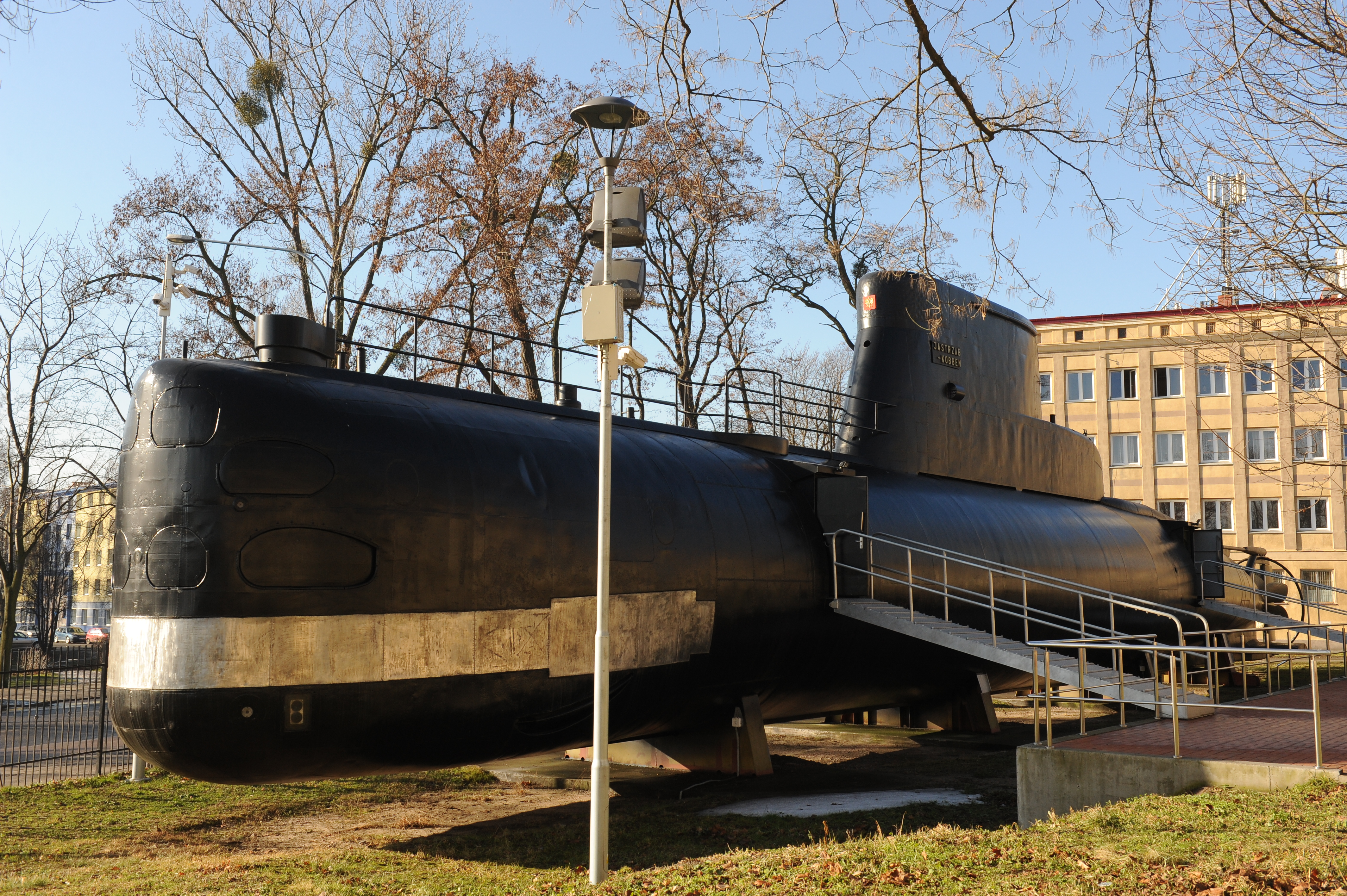 Okręt podwodny typu Kobben (nieoficjalna nazw „Jastrząb-Kobben) przeniesiony został na teren Akademii Marynarki Wojennej w 2011 roku. Funkcjonuje jako symulator, wyposażony w laboratoria i stanowiska badawcze. Jednostka waży 370 ton, ma 45,5 metra długości, 4,6 metra szerokości i 8,9 metra wysokości. Okręt przypłynął do Polski z Norwegii w 2002 roku jako jedna z pięciu jednostek tego typu. Wykorzystywany był jako baza części zamiennych.